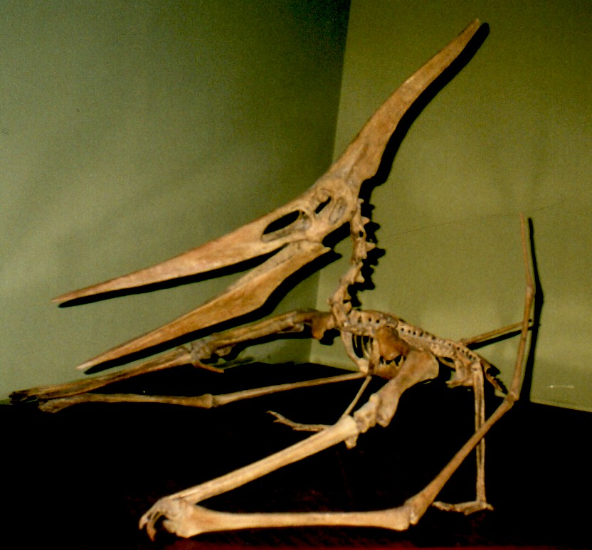 Pteranodon cast in Vienna